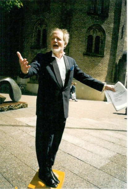 Gadedigteren Christian Kronman foran Rundetårn i København, 1997.